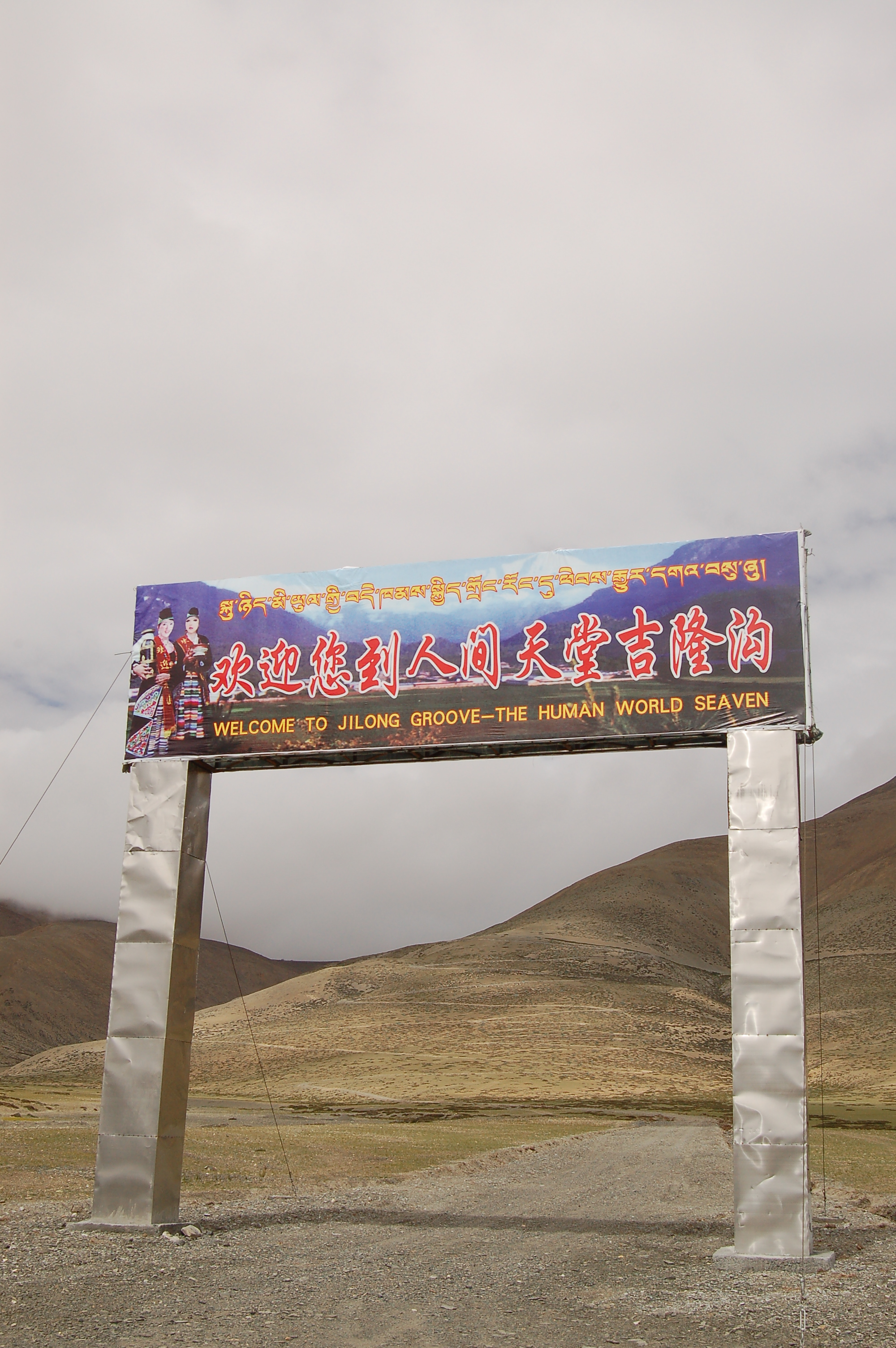 Tibet: Grenzschild zum Kyirong Distrikt